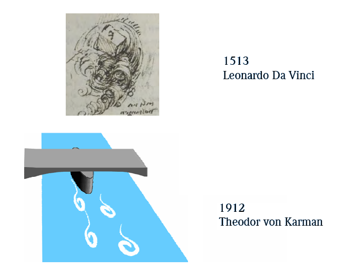 Vortex Geschichte (Aufzeichnung Leonardo da Vinci und Karman